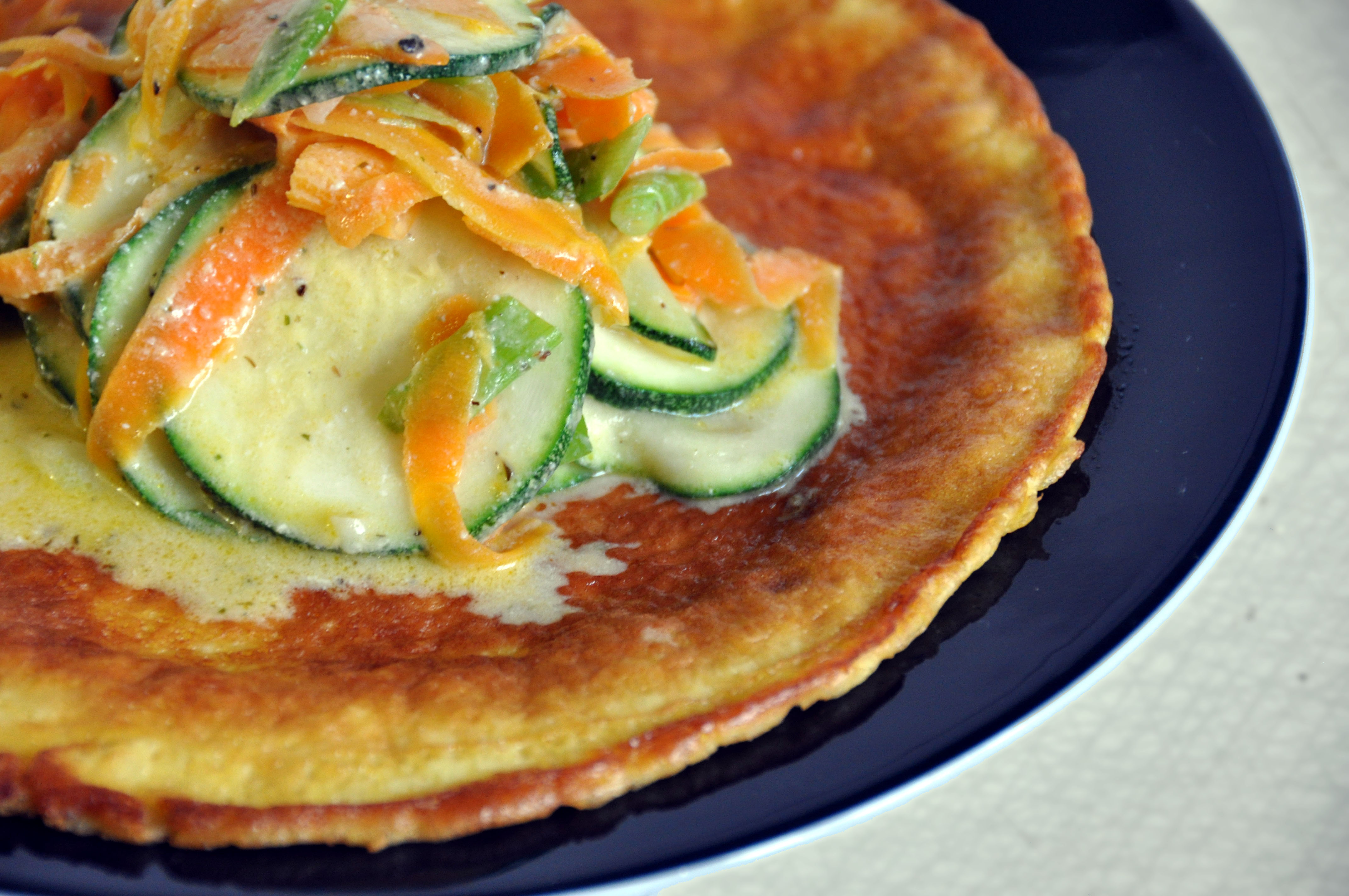 Omelet med squash, forårsløg, gulerødder og gedeost